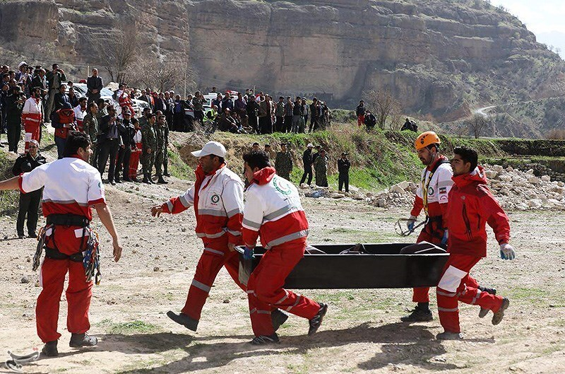 عملیات جستجو در محل سقوط هواپیمای CL۶۰ ترکیه